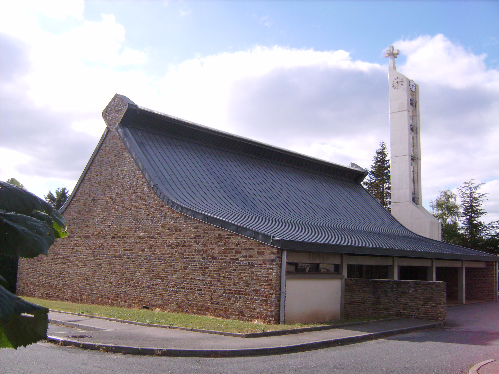 Cette photographie a été prise depuis la rue des Écoliers de la commune de Luc-la-Primaube (Aveyron). Elle représente l'église de la Primaube, bâtie au XXe siècle.